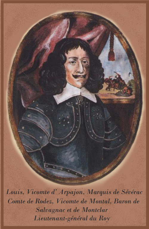 Der Herzog von Apajon auf einem alten Gemälde (Repro)